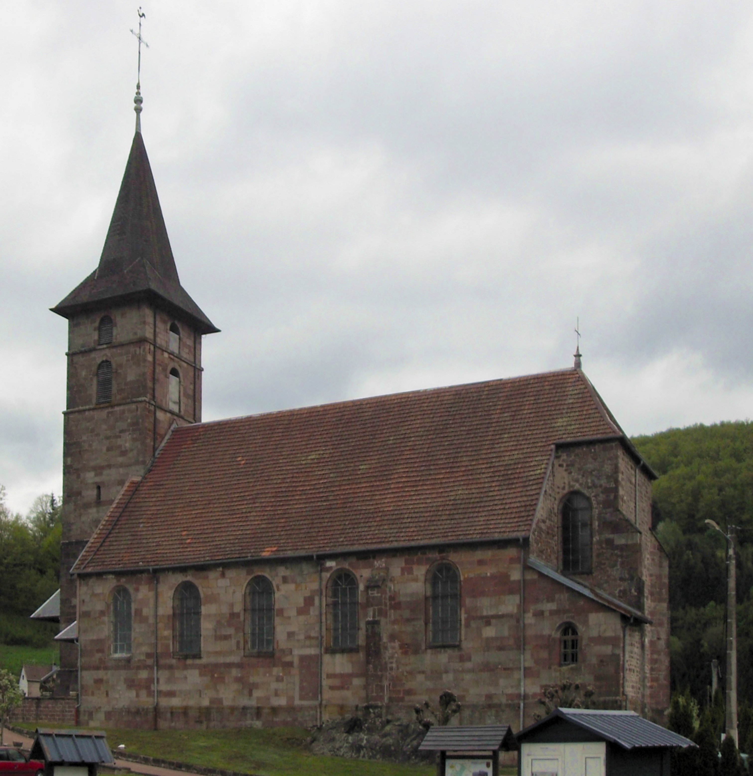 L'église Notre-Dame-de-l'Assomption à Servance